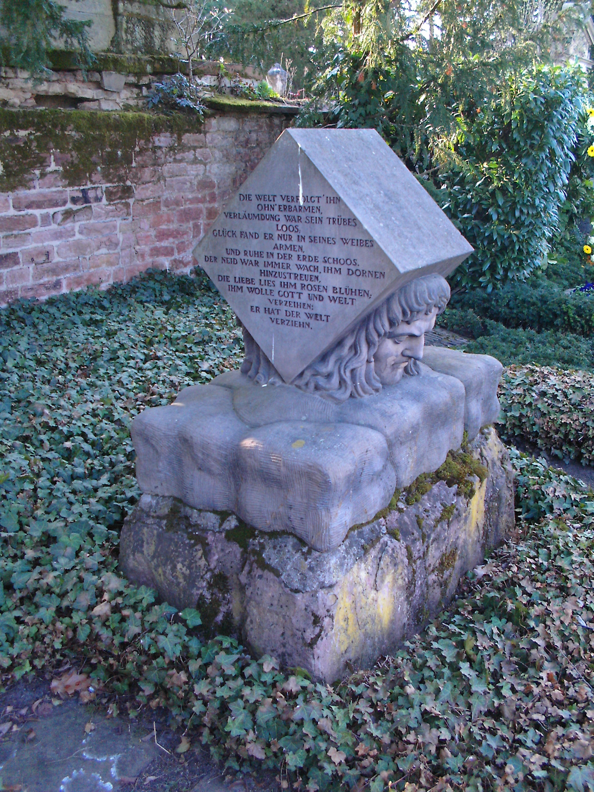 Grabstein August von Kotzebue (Rückseite mit Grabspruch), Hauptfriedhof Mannheim, Werk des Maximilian Joseph Maria Pozzi, Massimiliano Giuseppe Maria P. (1770–1842), Bildhauer